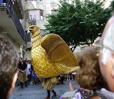 L'Àliga de Reus pels carrers de la ciutat per la Festa Major